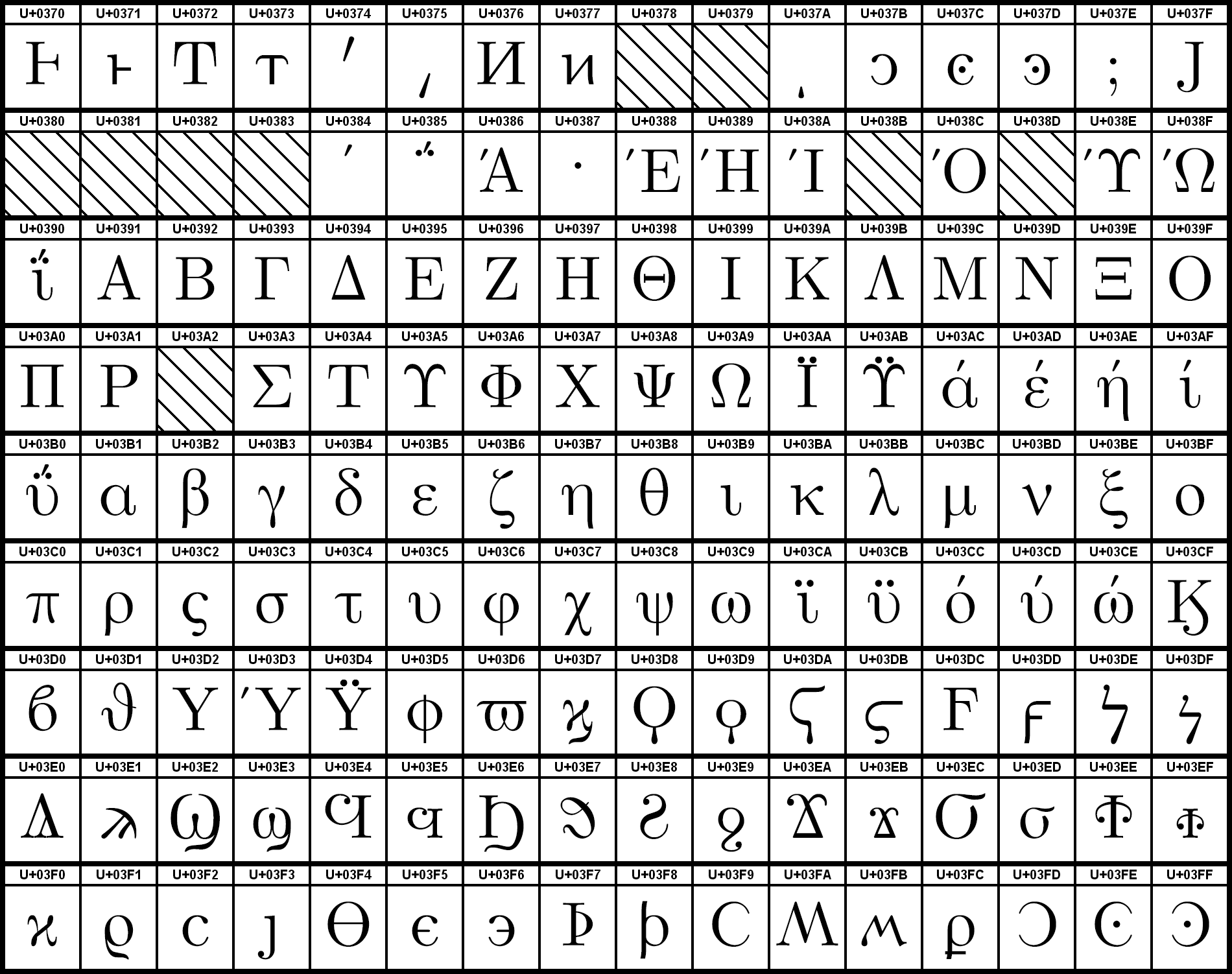 Grafiktafel für den Unicodeblock Griechisch und Koptisch. Schraffierte Felder sind unbesetzte Codepoints.